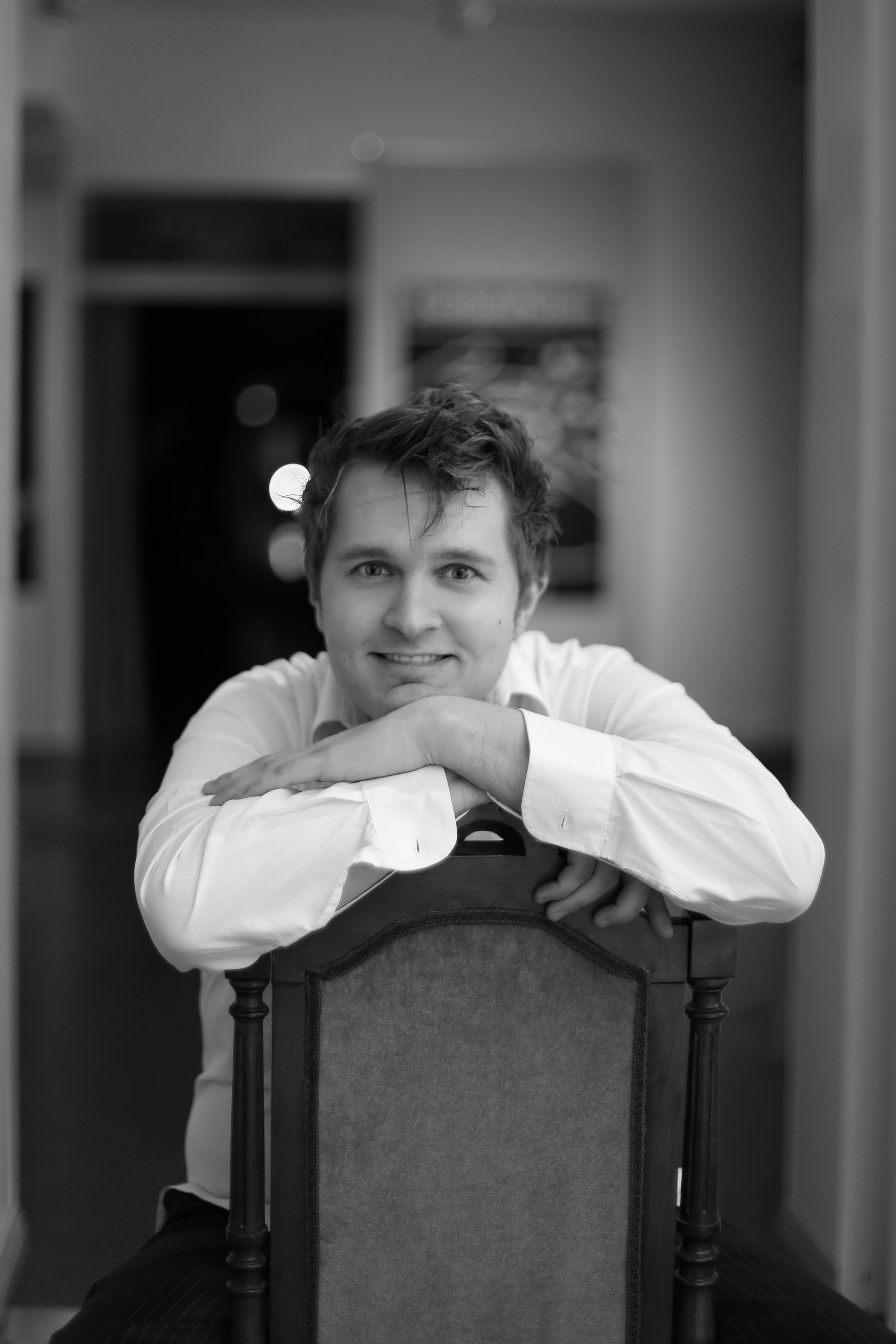 Pianisti Tuomas Nikkanen